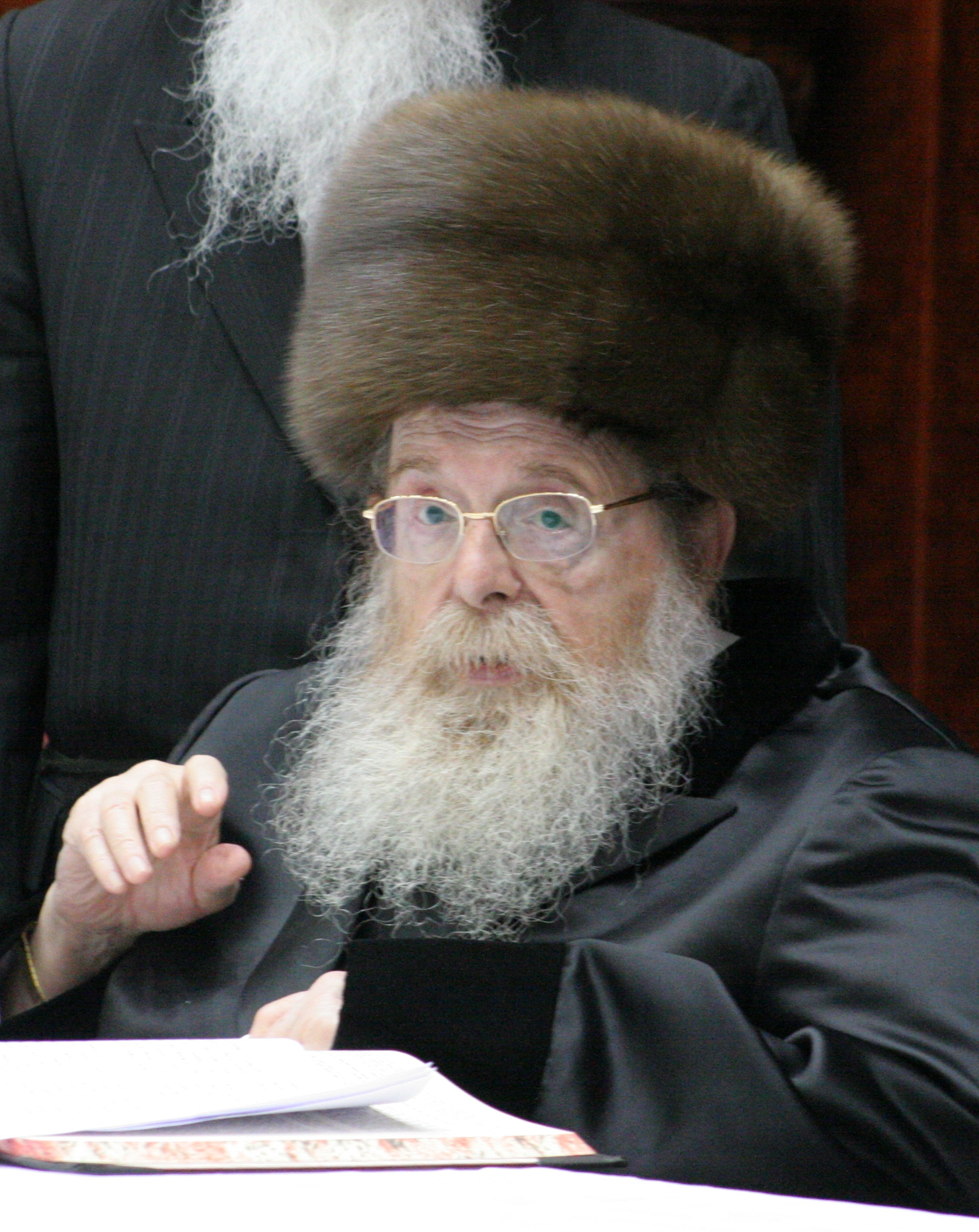 האדמו"ר מסדיגורה הנוכחי רבי אברהם יעקב פרידמן